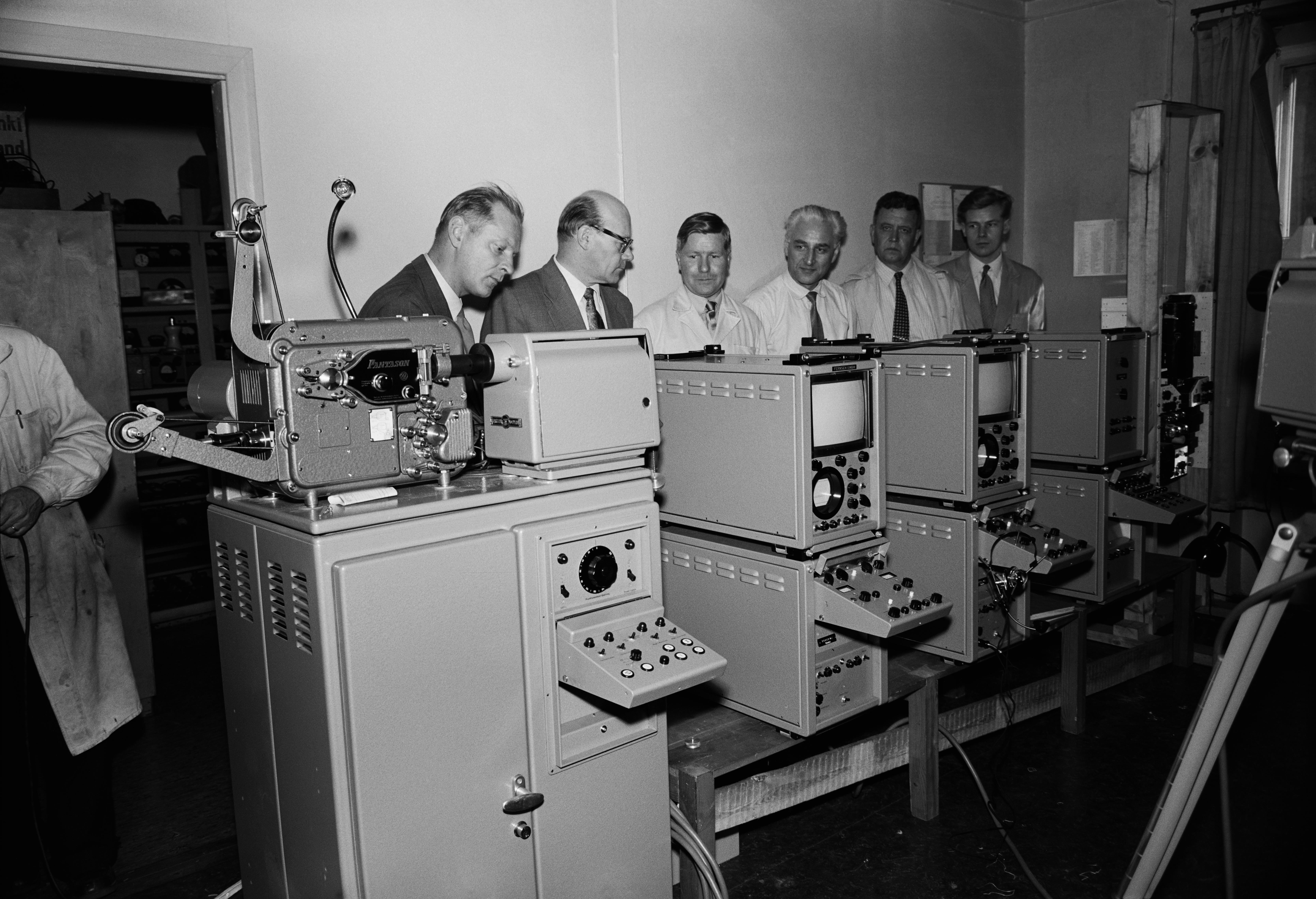 Yleisradio's workshop in Helsinki. Finnish Broadcasting Company loaned from Fernseh GmbH a Pantason 16 mm film projector, monitor and control devices for vidicon cameras and a sync pulse generator. Finnish Broadcasting Company was able to transmit and show films on a television set during The Radio And Television Exhibition 6.-14.10.1956. Behind the equipment Sven Lounastörmä, Matti Wihuri, Lauri Häkkinen, Johannes Günther (Fernseh GmbH, Germany), Kaarlo Sainio and Eero Heliö, all M.Sc (Tech.). Photo: Ruth Träskman/Yle. Yleisradion työpajalle asennetun RCA:n televisiolähettimen avulla pystyttiin näyttämään filmejä televisiossa Kauppakorkeakoululla pidetyssä näyttelyssa, "Radio ja televisio tänään" 6.-14.10.1956. Tämä onnistui Saksasta Fernseh GmbH:lta lainatuilla laitteilla. Pantason 16 mm filmiprojektori, josta saatavan kuvan muuttaa Fernseh GmbH:n valmistama vidicon-kamera tv-kuvaksi. Kahden vidicon-kameran tarkkailu- ja säätölaitteet ja viimeisenä laitteiden yhteinen tahtipulssikeskus. Oikeassa reunassa on, vain osittain näkyvissä, yksi vidicon-kamera jalustalla. Säätölaitteiden takana ovat Yleisradion televisioinsinööri, DI Sven Lounastörmä, DI Matti Wihuri, radioalan yhteistyövaliokunnan puheenjohtaja, DI Lauri Häkkinen, tuotantopäällikkö, DI Johannes Günther (Fernseh GmbH, Saksa), Yleisradion yli-insinööri, DI Kaarlo Sainio (Kalle Sainio, K.S. Sainio) ja DI Eero Heliö. Tiedätkö jotain tästä kuvasta? Jätä kommentti tai ota yhteyttä sähköpostitse: Tutustu Ylen arkistosisältöihin: Fler skatter från Yles arkiv: More about Yle, the Finnish Broadcasting Company